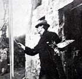 Painter Stanhope Forbes (1857-1947)